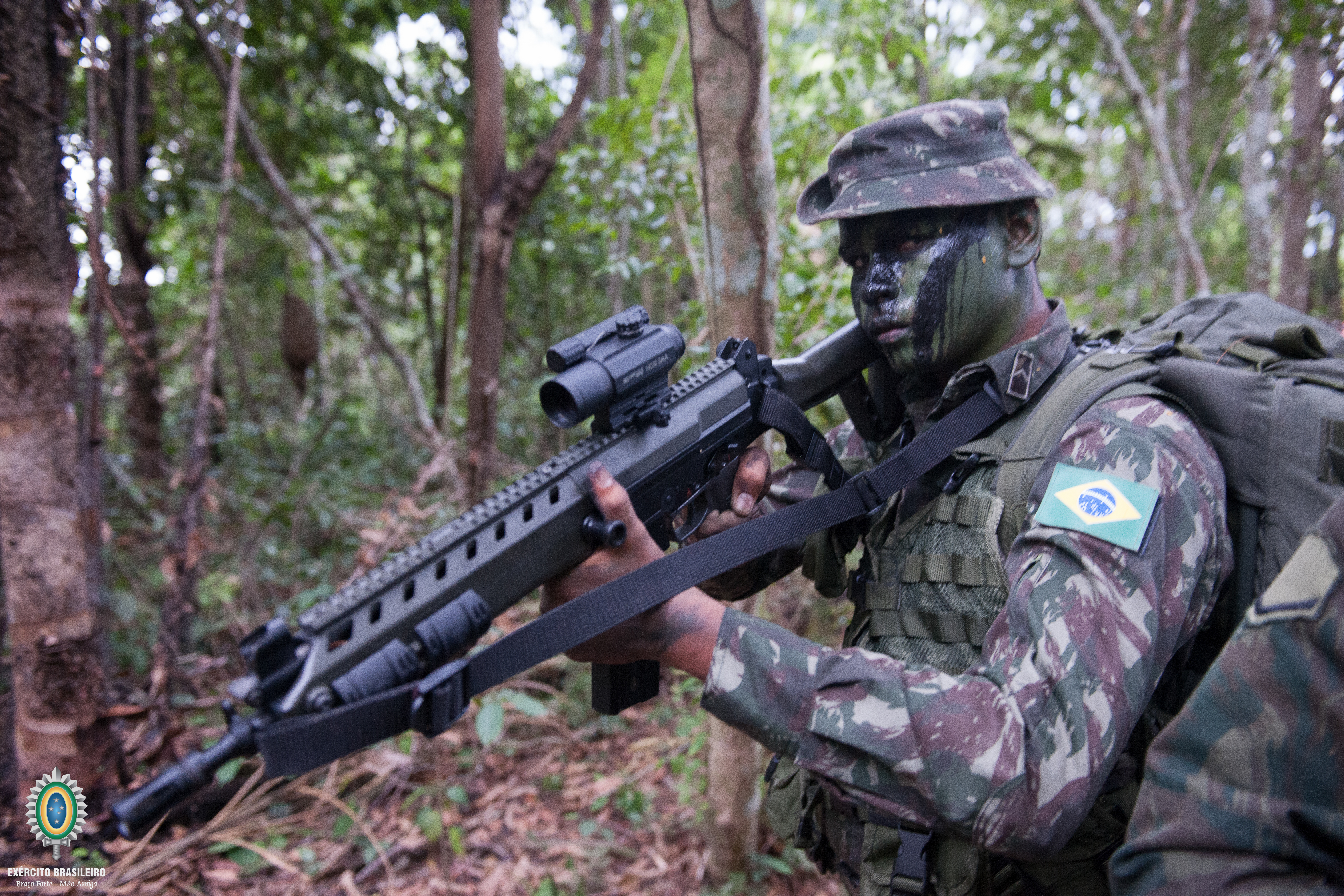 Selva, guerra na selva,combatente, Exército, solado, indio